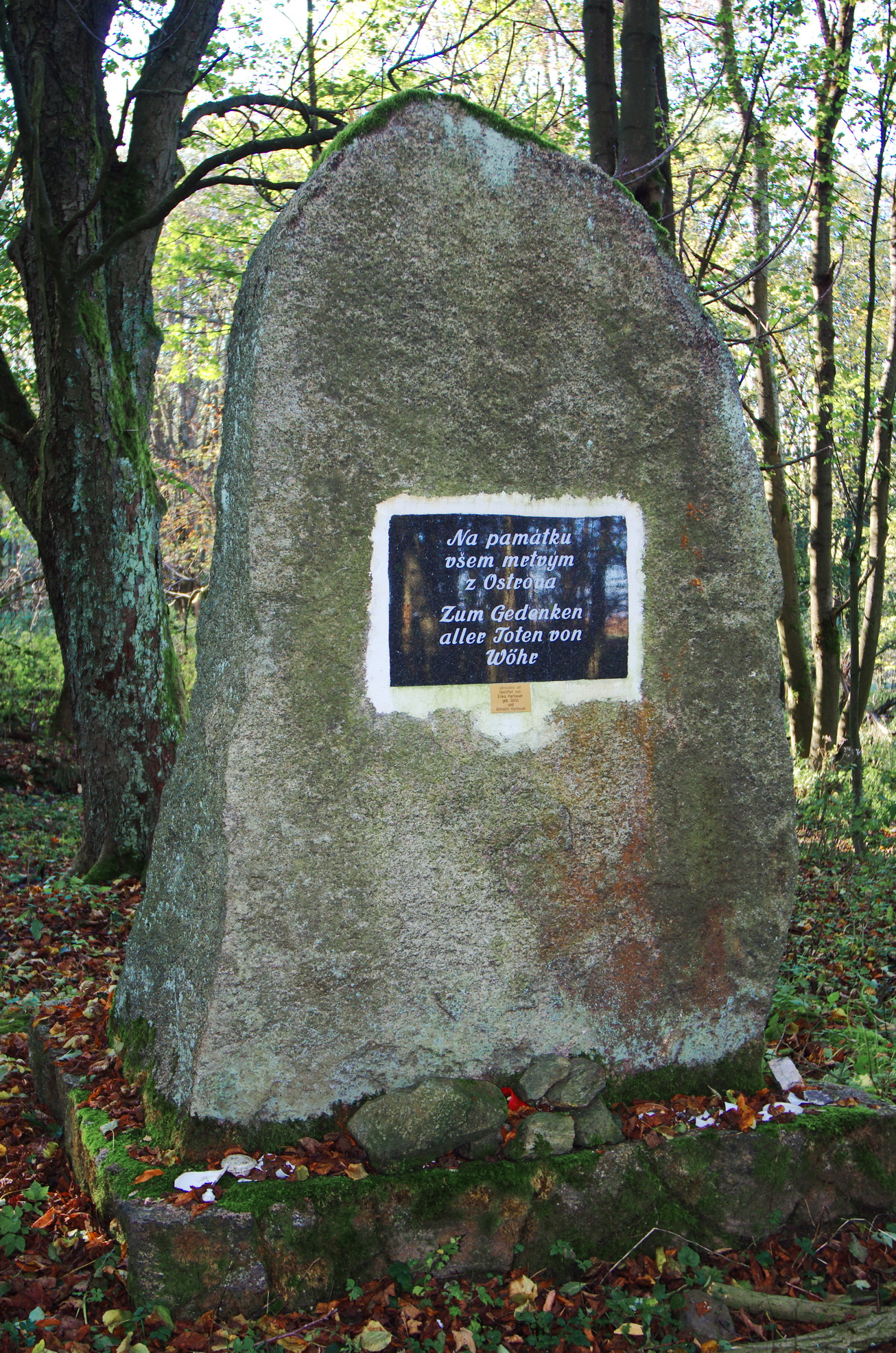 památník v zaniklé obci Ostrov (Wöhr) ve Slavkovském lese, okres Sokolov